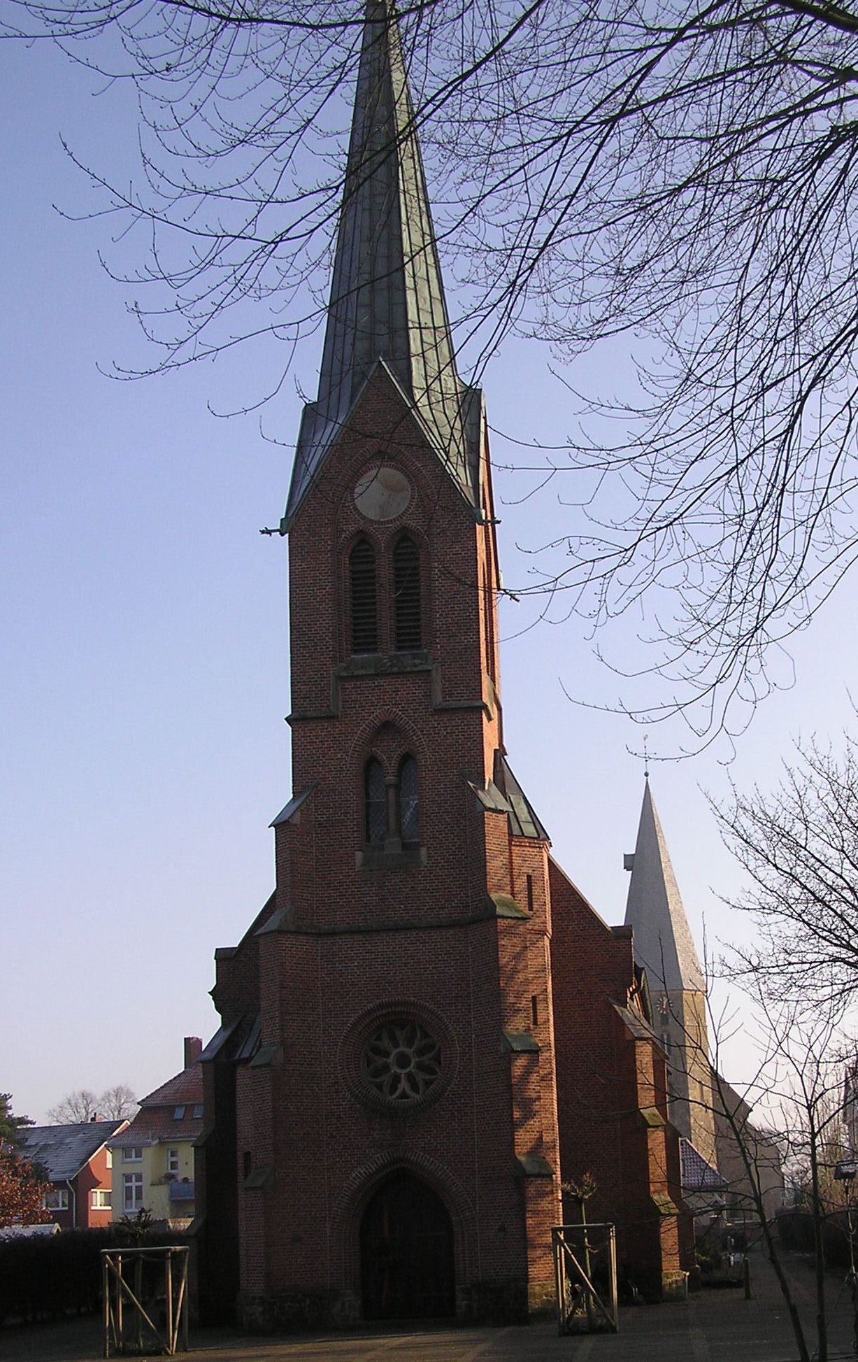 kath. Kirche St. Marien in Badbergen, Samtgemeinde Artland